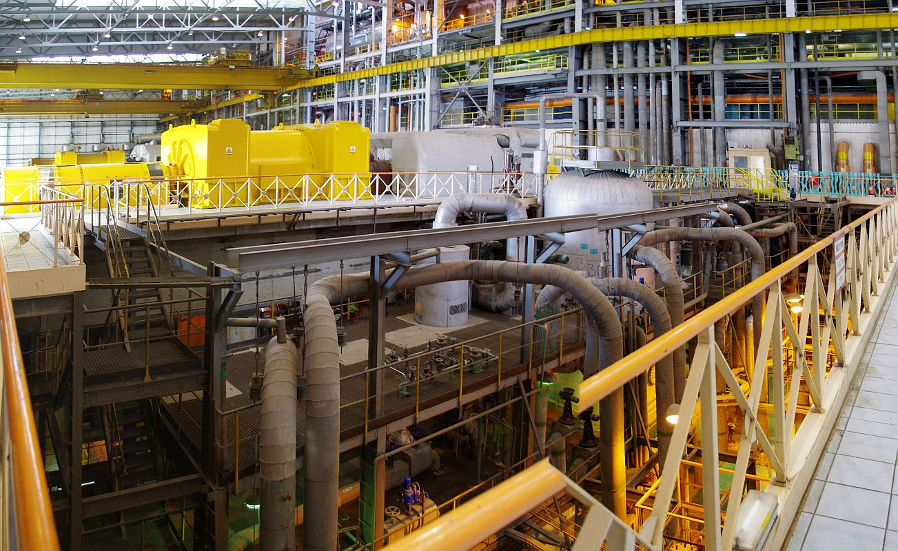 EC Kraków